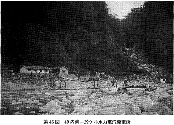 1909年興建之內灣水力發電所